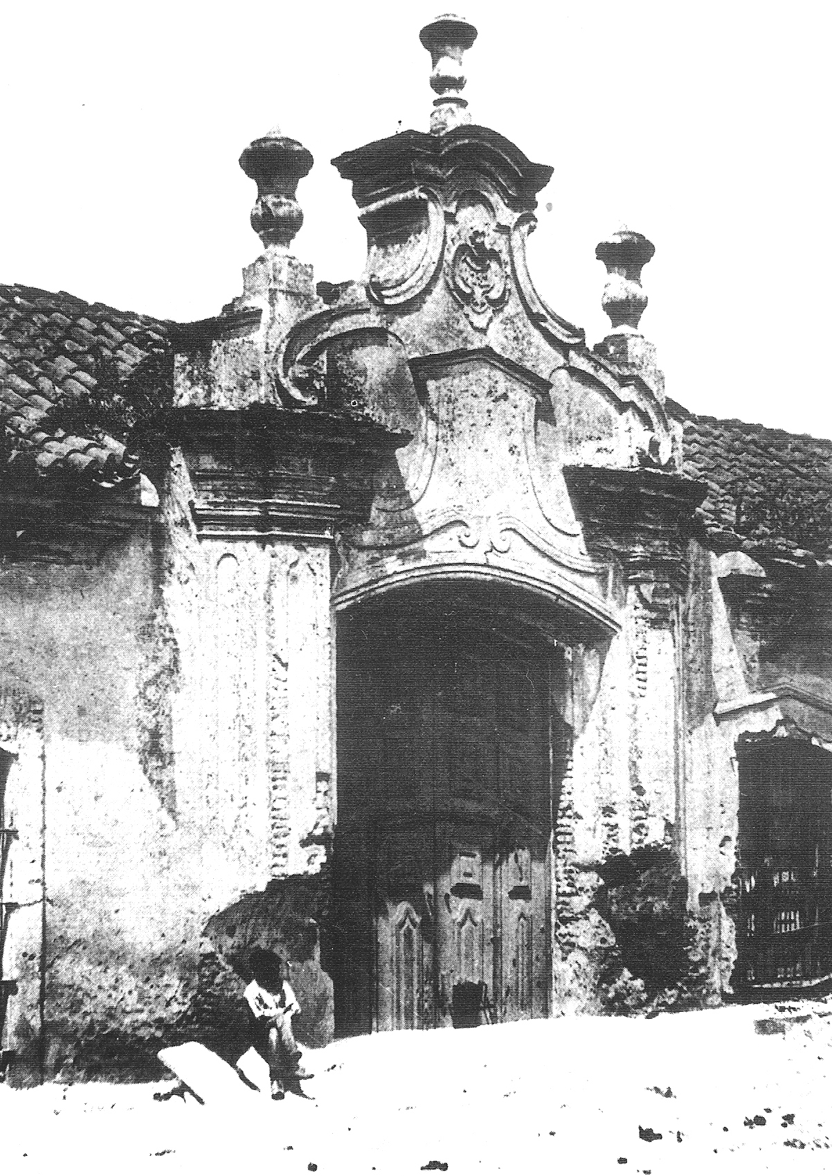 Ex sede de la Aduana, demolida a principios del Siglo XX que al crearse el virreynato del Río de La Plata funcionó desde 1778 en una casona con arquitectura de influencia portuguesa. Estaba situada cerca de Belgrano y Av. Paseo Colón y fue propiedad de las familias Aguirre Azcuénaga y Basavilbaso.)